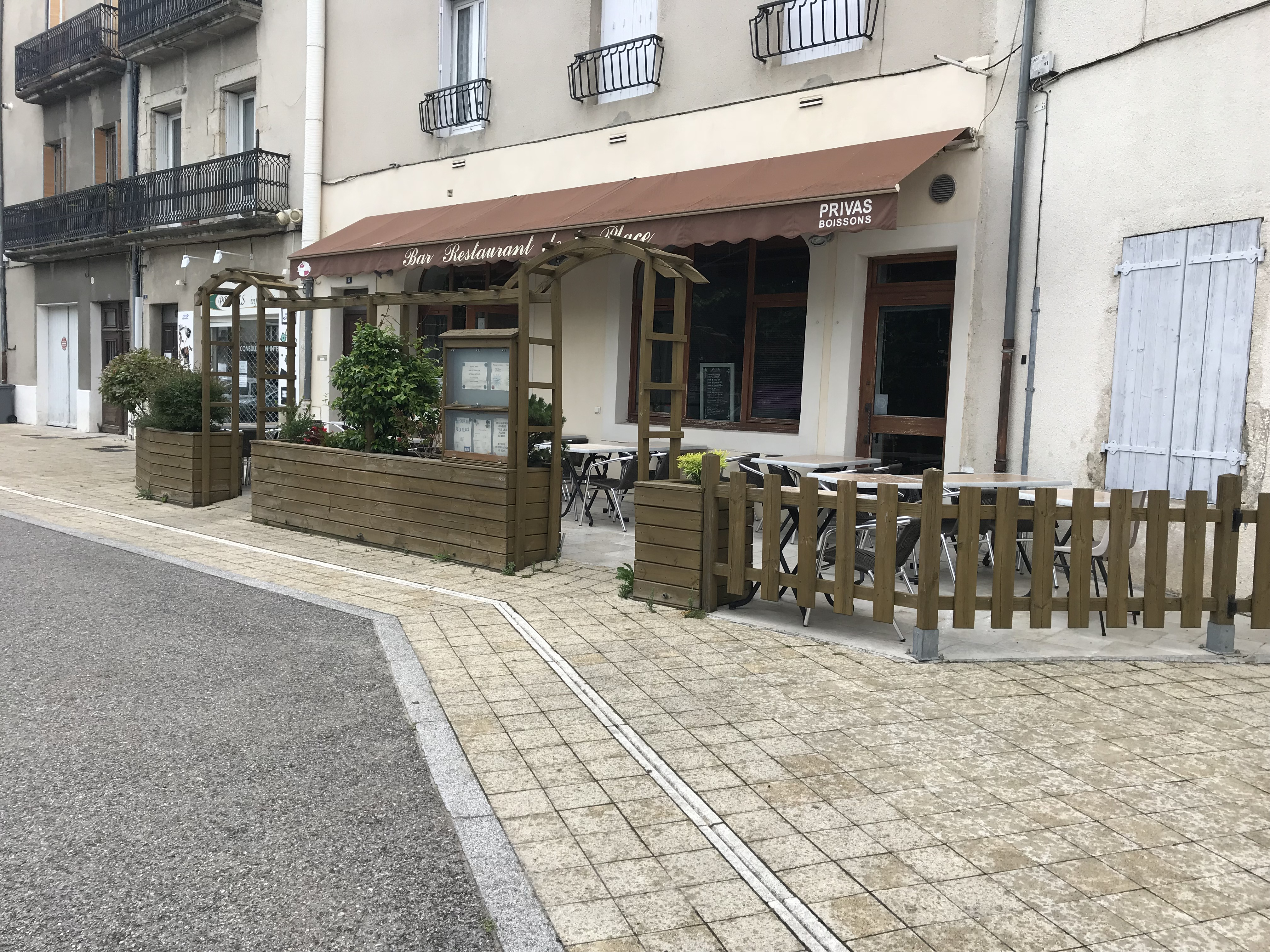 Image de Privas en Ardèche en France.